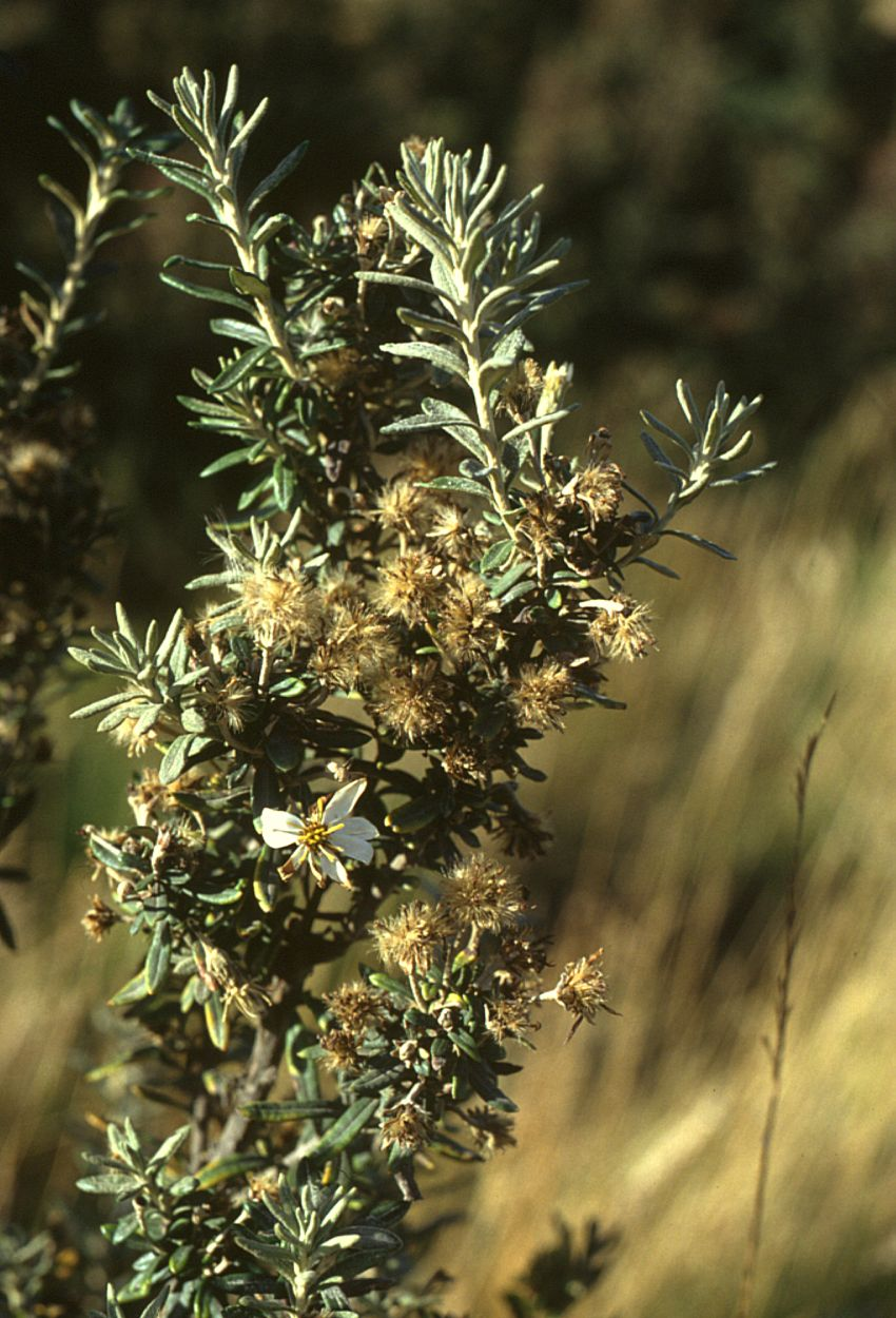 Chiliotrichum diffusum, Korbblütler (Asteraceae) - Chile, Patagonien/Patagonia, Parque Nacional Torres del Paine, bei Posada Río Serrano